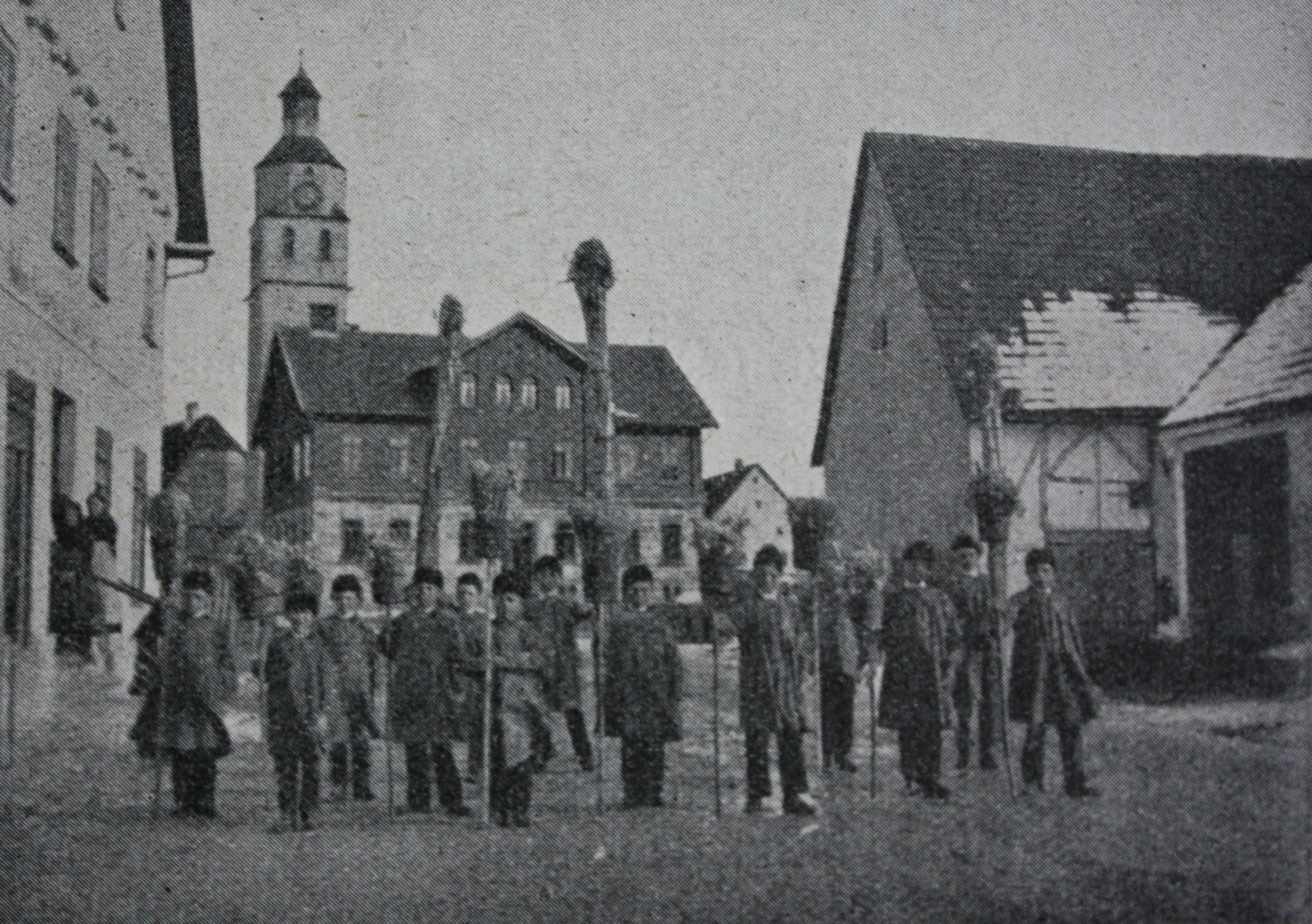 Funkensonntag 1908 in Seißen bei Blaubeuren. Originalbildunterschrift: "Abgang vom Dorf (Seißen)".